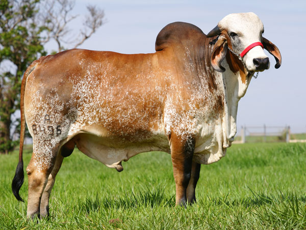 Gir Leiteiro